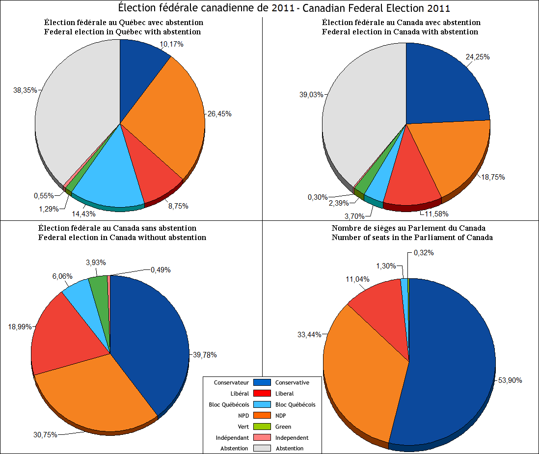 Résultats de l'élection fédérale canadienne de 2011 avec des diagrammes circulaires.